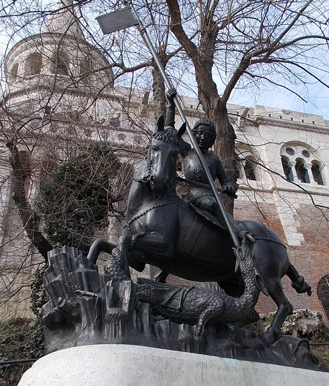 Szent György és a Sárkány szobor a Schulek Frigyes lépcsőnél. Halászbástya középső részénél. - Budapest I. kerület, Várnegyed városrész